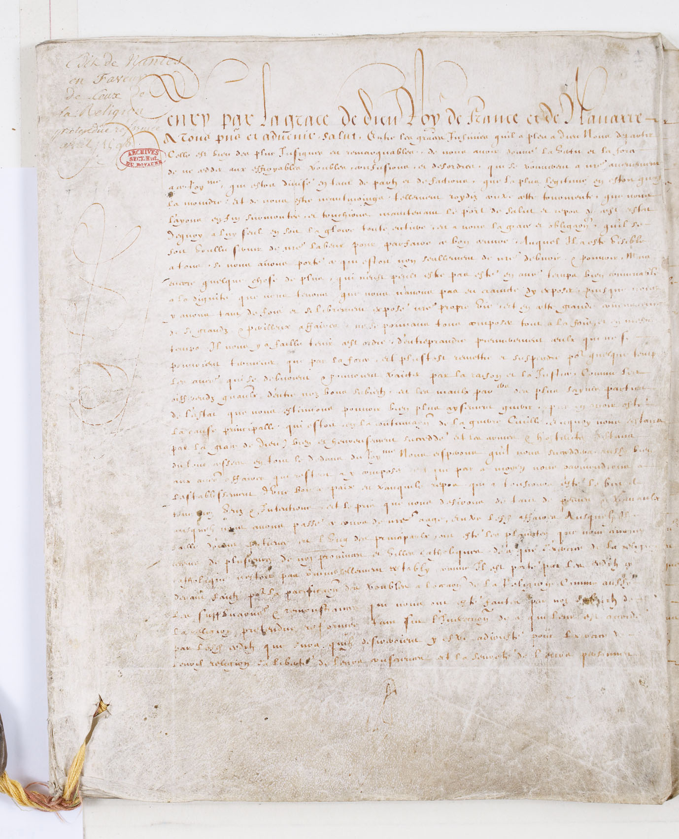 Première page de la version de l'édit transmise pour enregistrement au Parlement de Paris